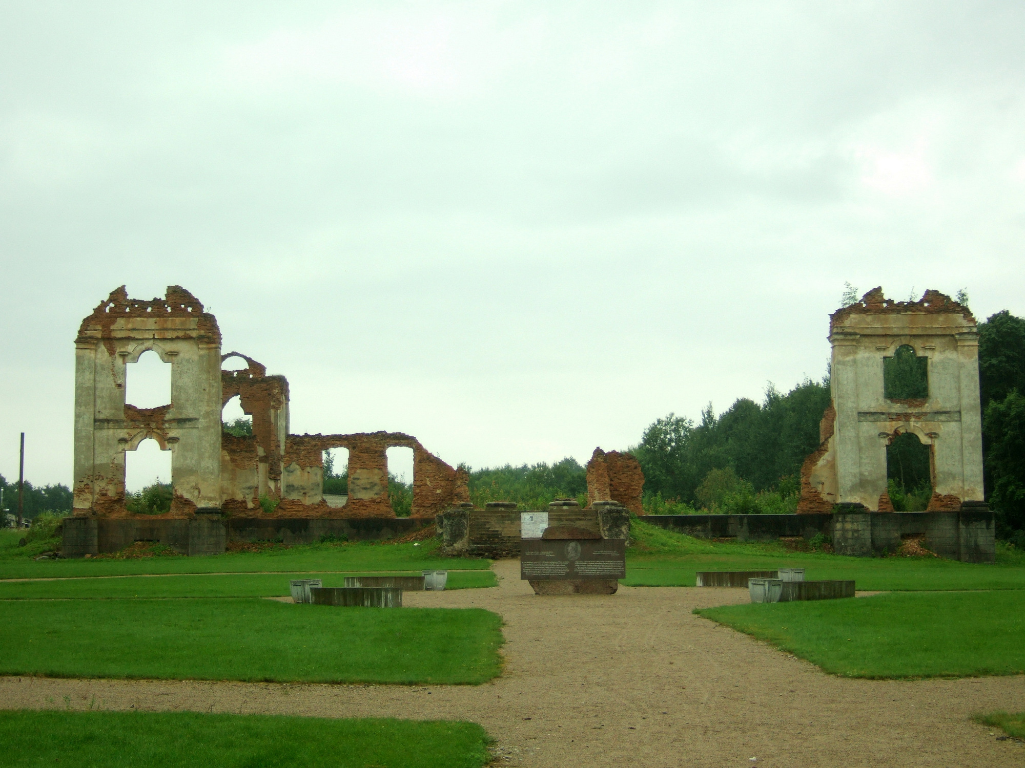 Paulavos respublikos dvaro liekanos ir informacinė lenta